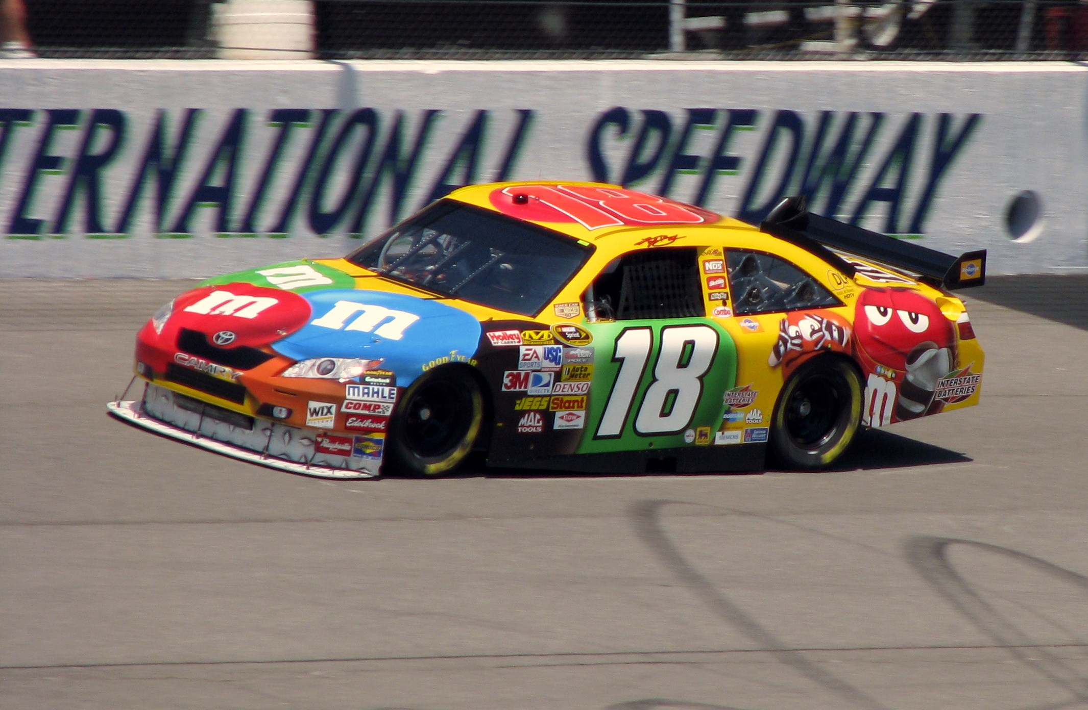 NASCAR Sprint Cup practice - June 14, 2008